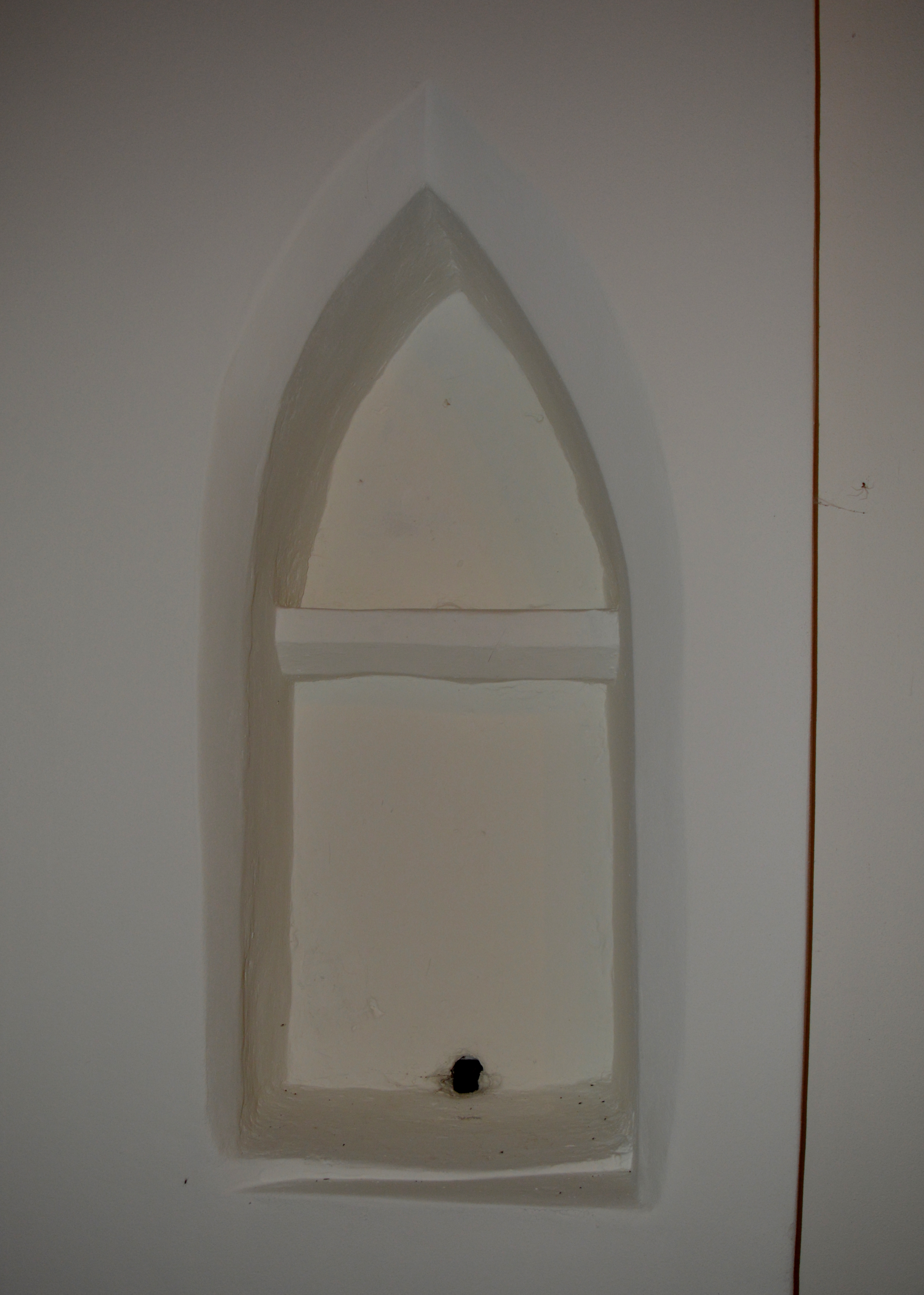 Deersum, Nicolaaskerk, piscina